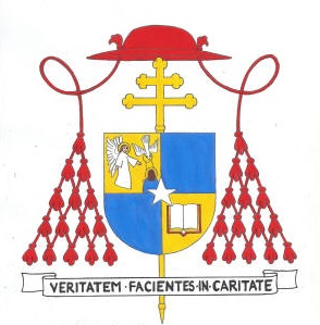 Brasão do Cardeal José Alí Lebrún Moratinos, Arcebispo Emérito de Caracas.